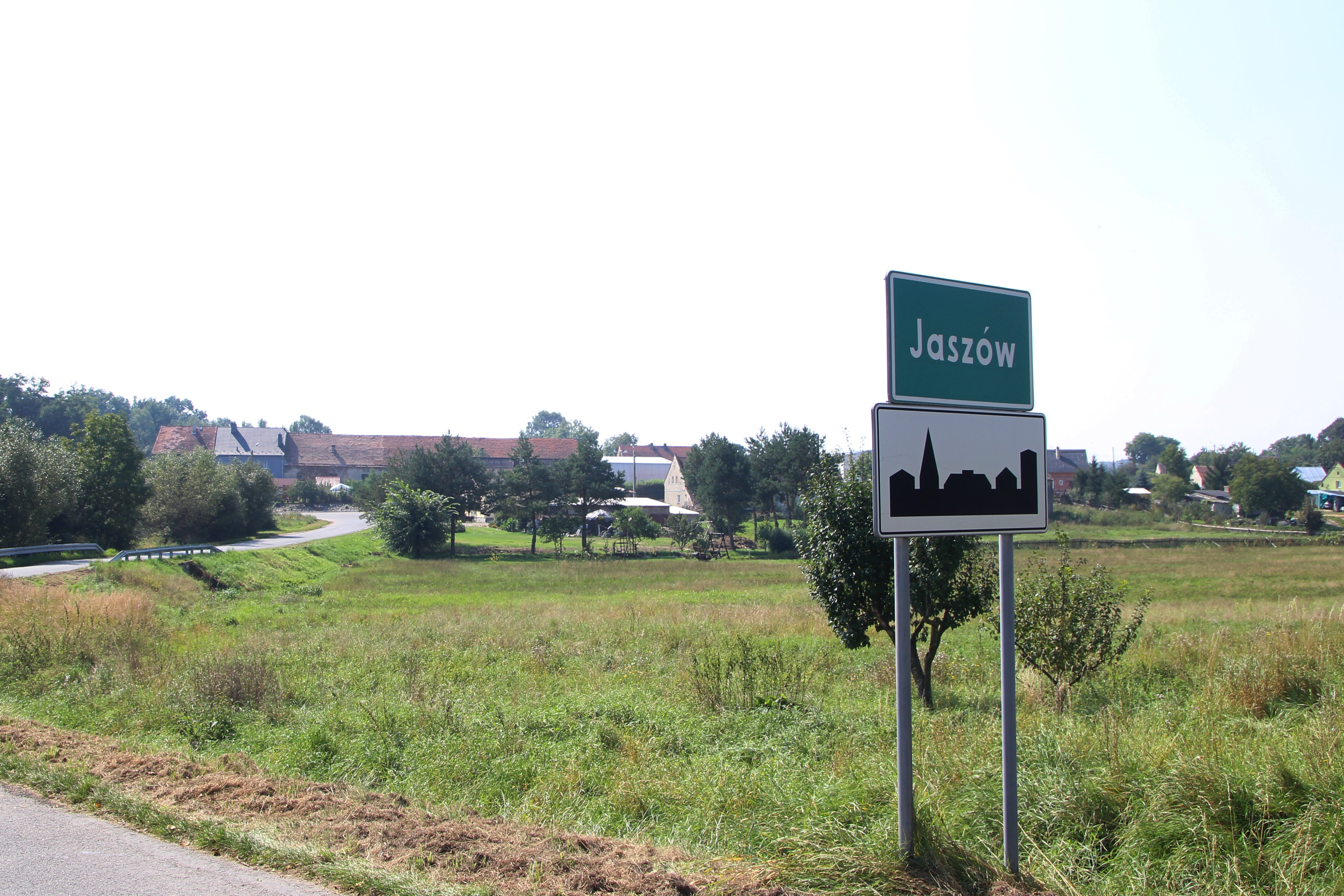 Jaszów – wieś w Polsce położona w województwie opolskim, w powiecie brzeskim, w gminie Grodków.